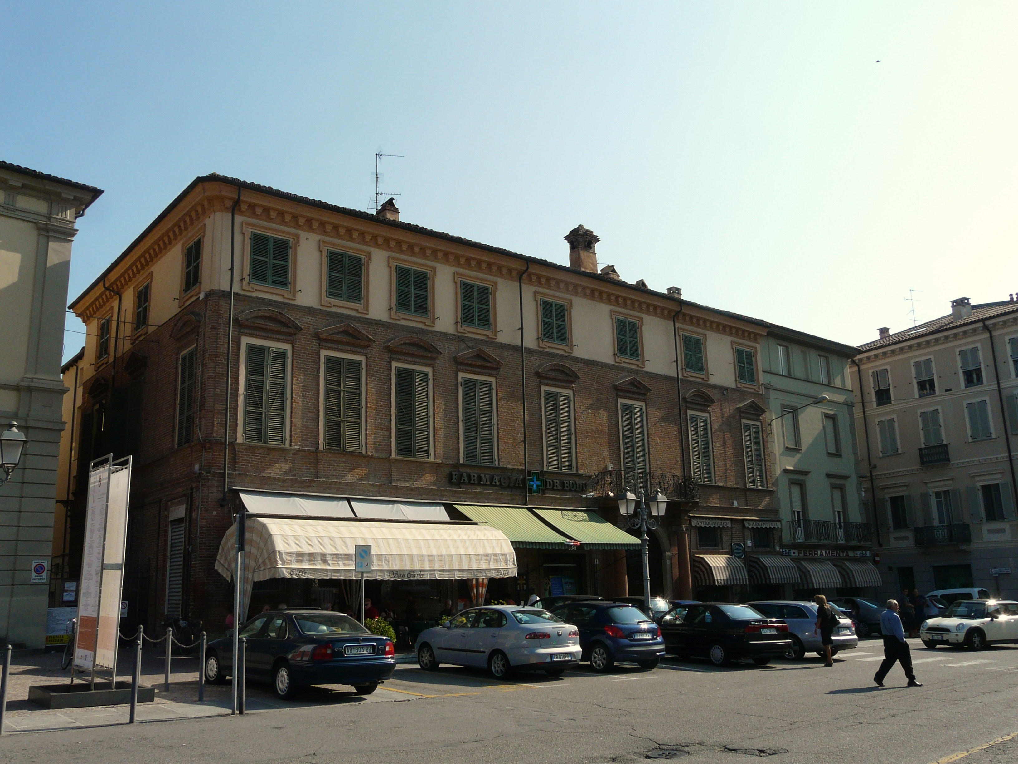 Palazzo Sacchi-Nemours, Casale Monferrato, Piemonte, Italia